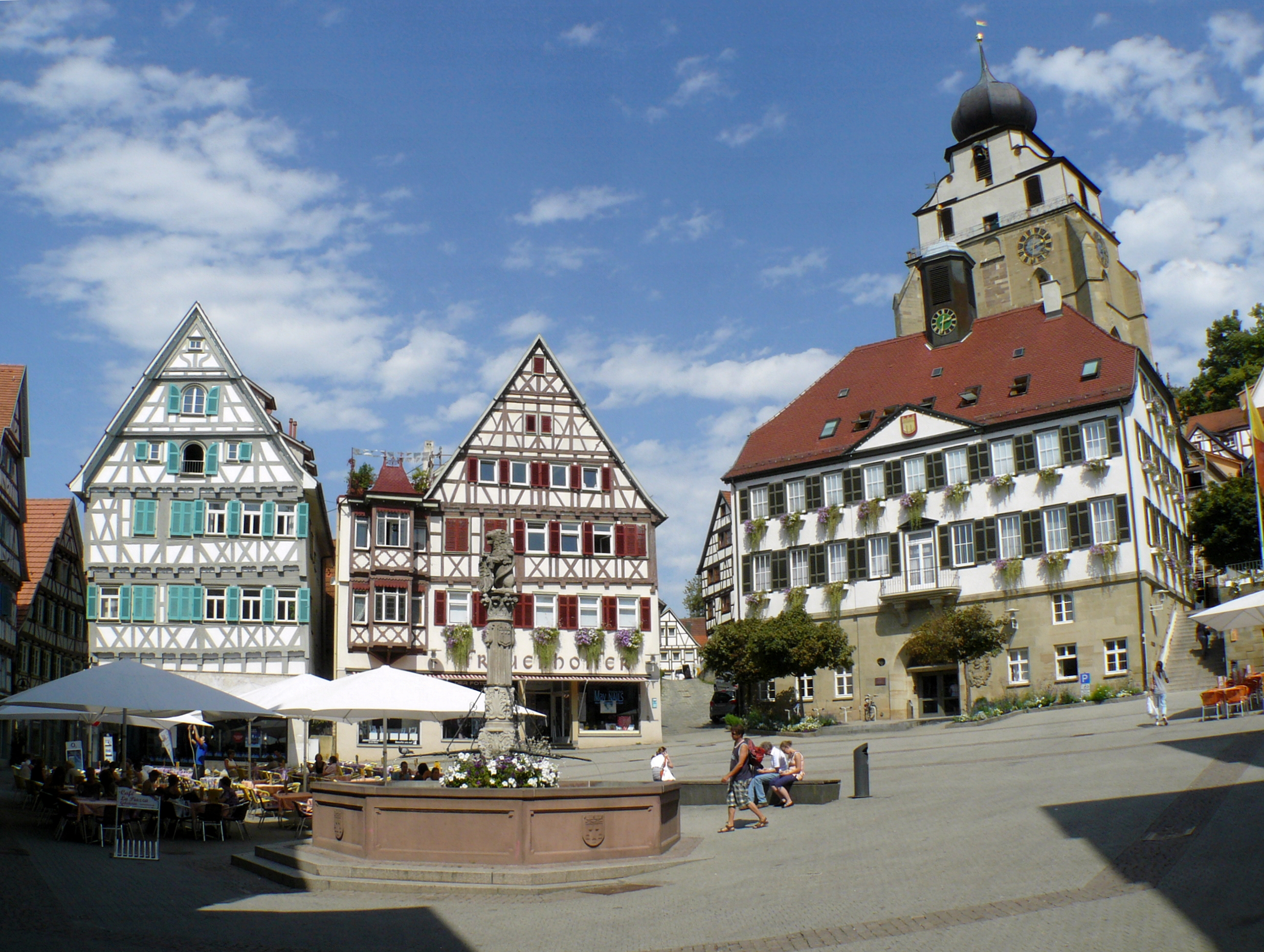 Herrenberger Marktplatzansicht mit Rathaus, Altstadthäusern und Marktbrunnen sowie Stiftskirche im Hintergrund